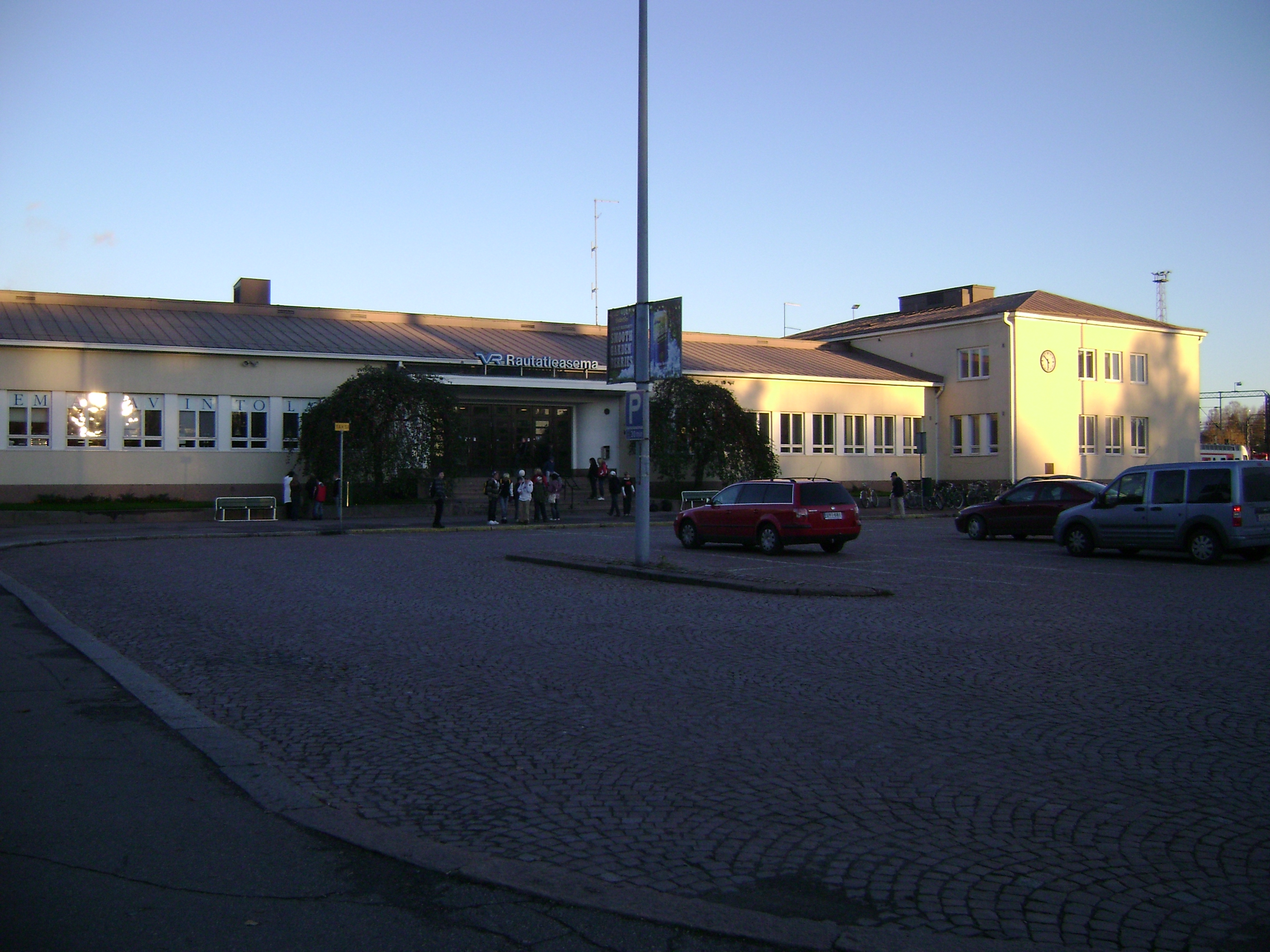 Riihimäen rautatieasema